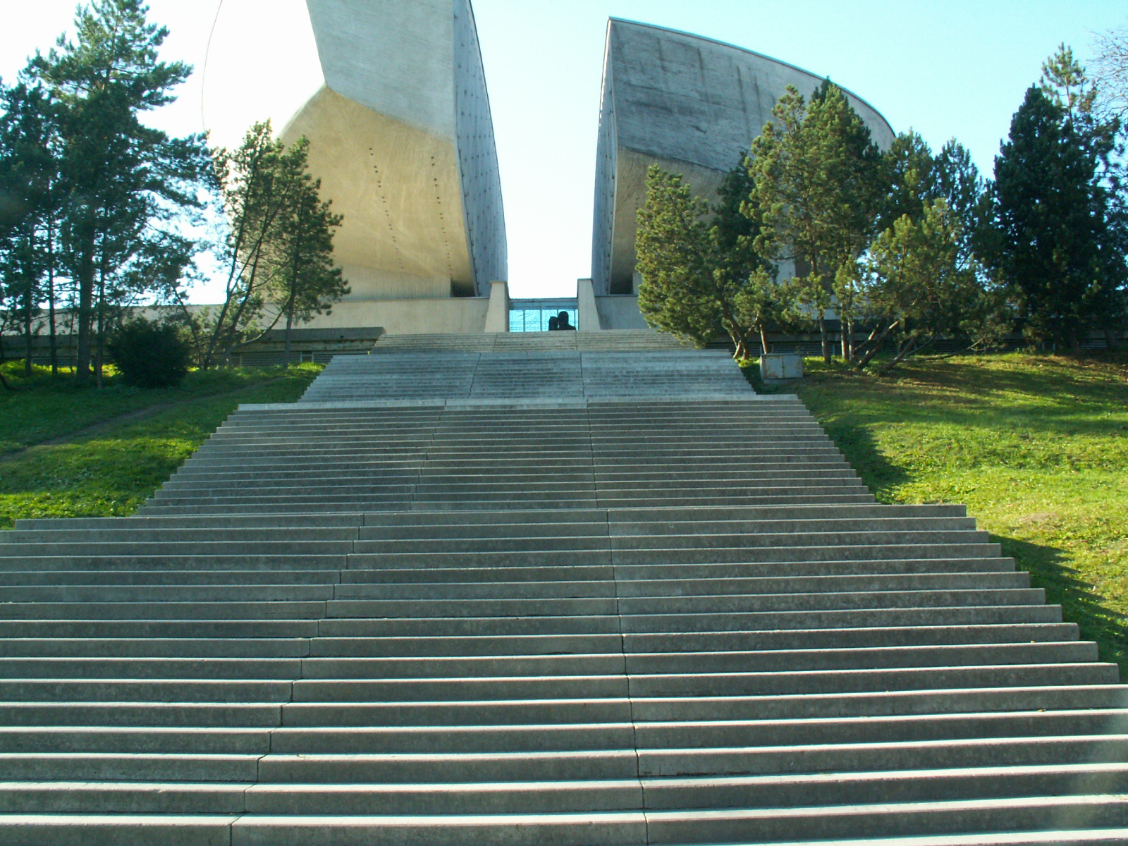 Múzeum SNP